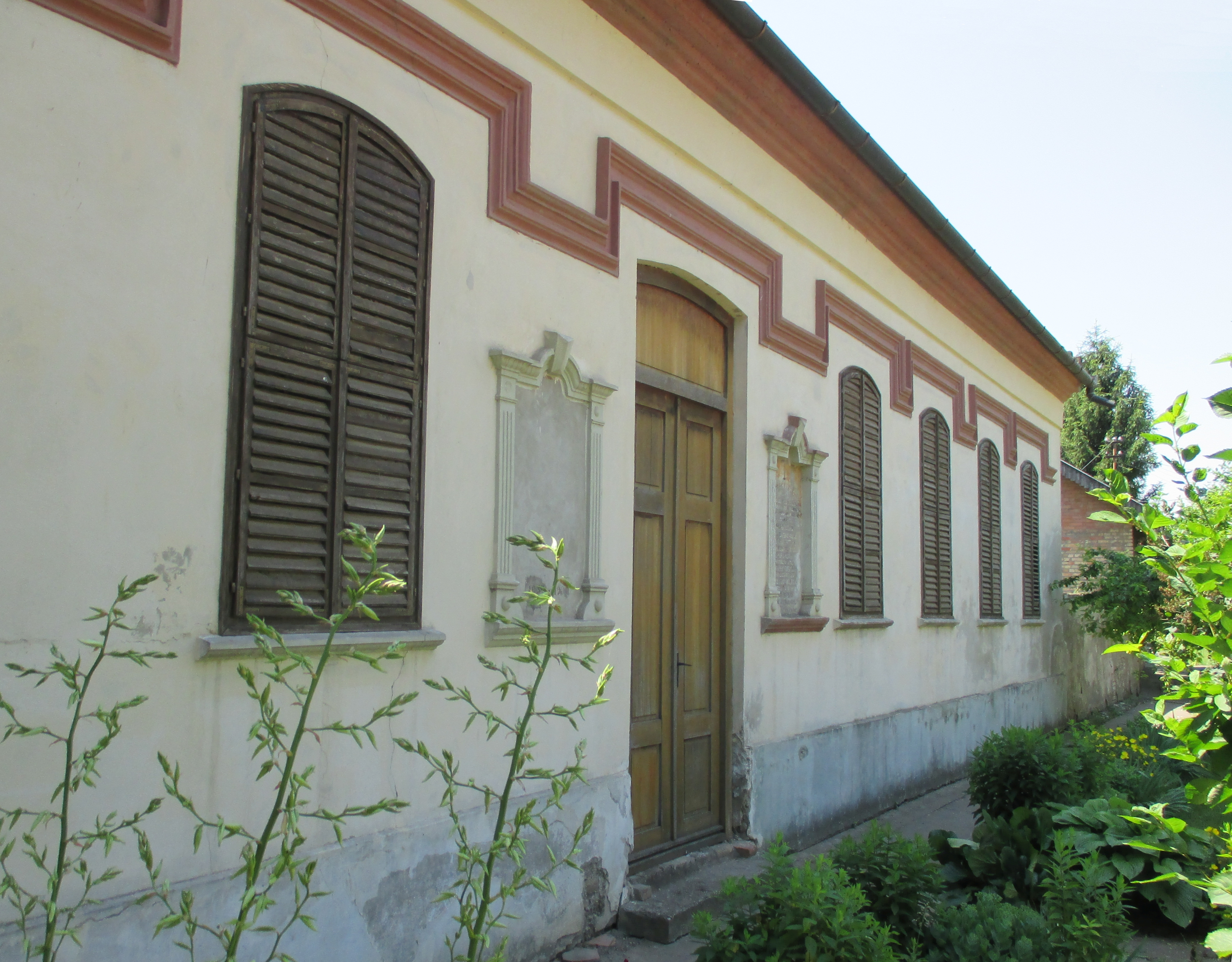 Srpski (latinica): Nepokretno kulturno dobro / SK 1843